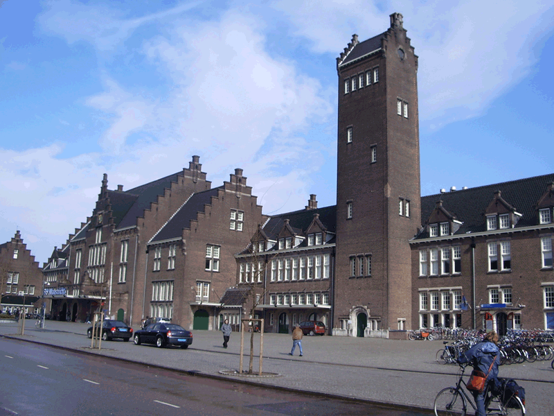 Station Maastricht, maart 2006 Maastricht